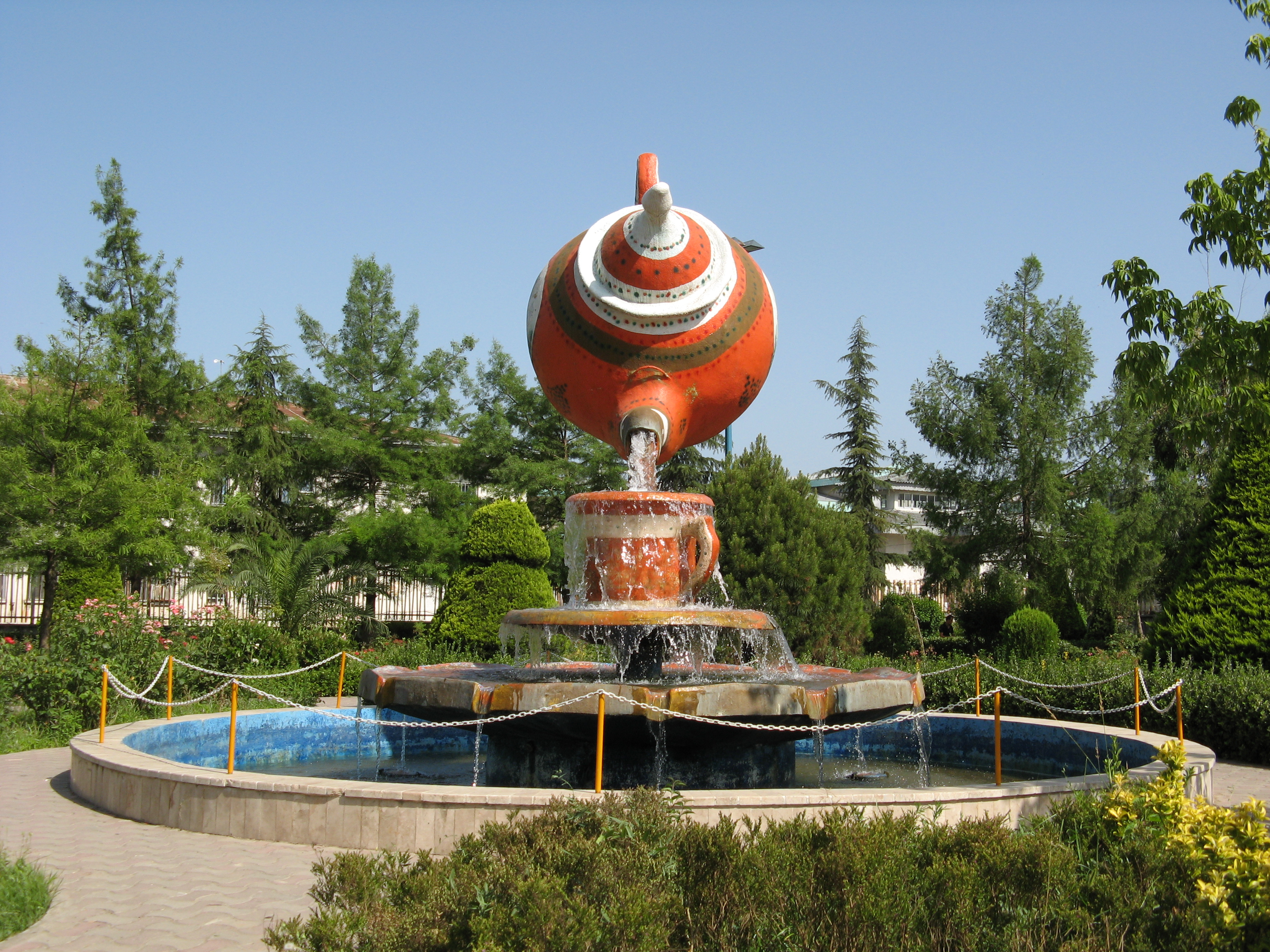 Lahijan, Guilan